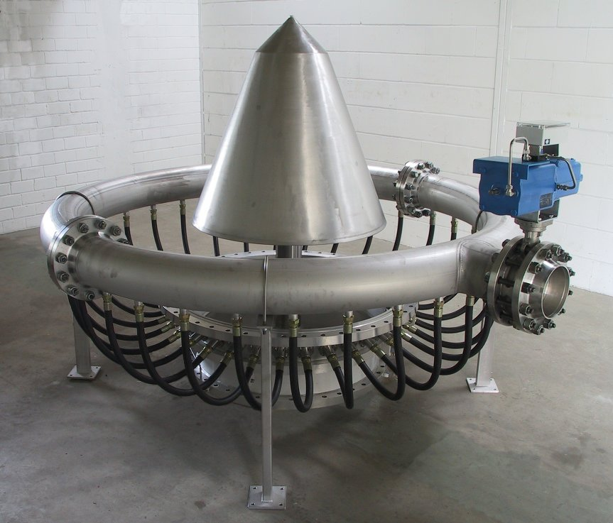 Mischeinrichtung